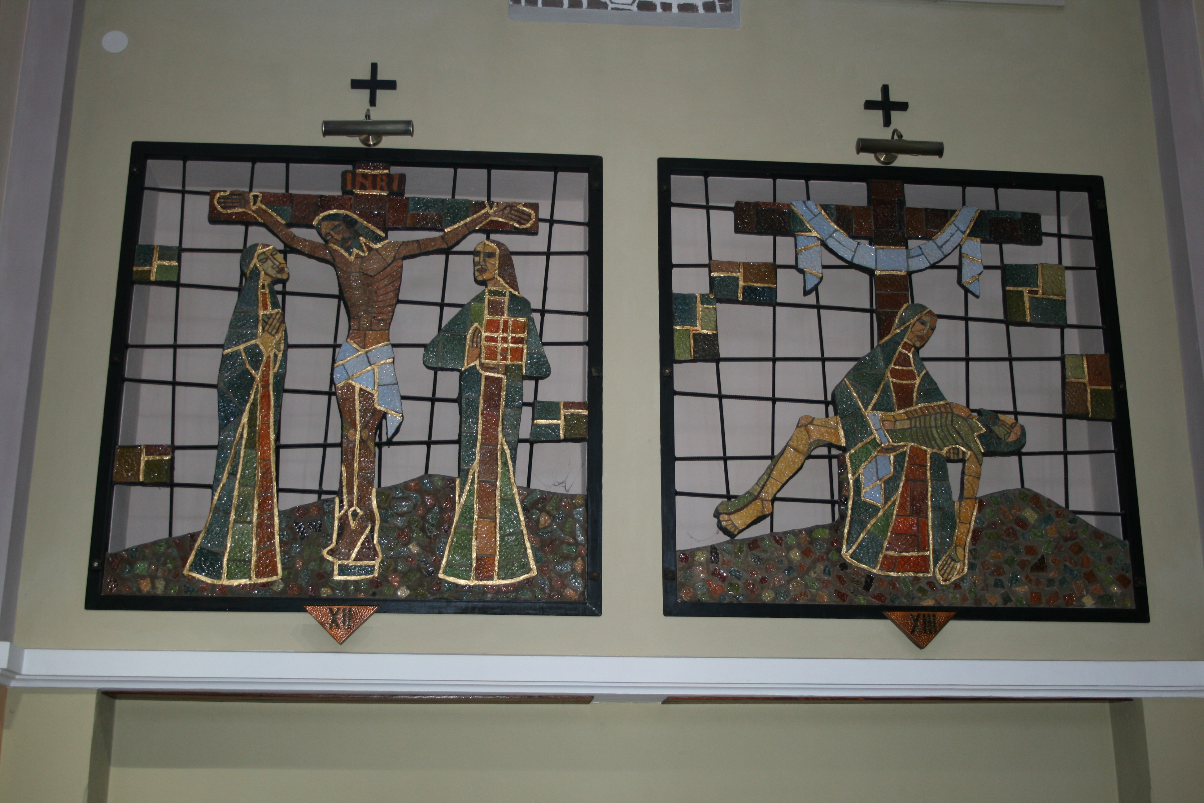 Stacje Drogi Krzyżowej w kościele pw. Nawiedzenia NMP w Medyni Głogowskiej koło Łańcuta wg projektu prof. Jana Budziło